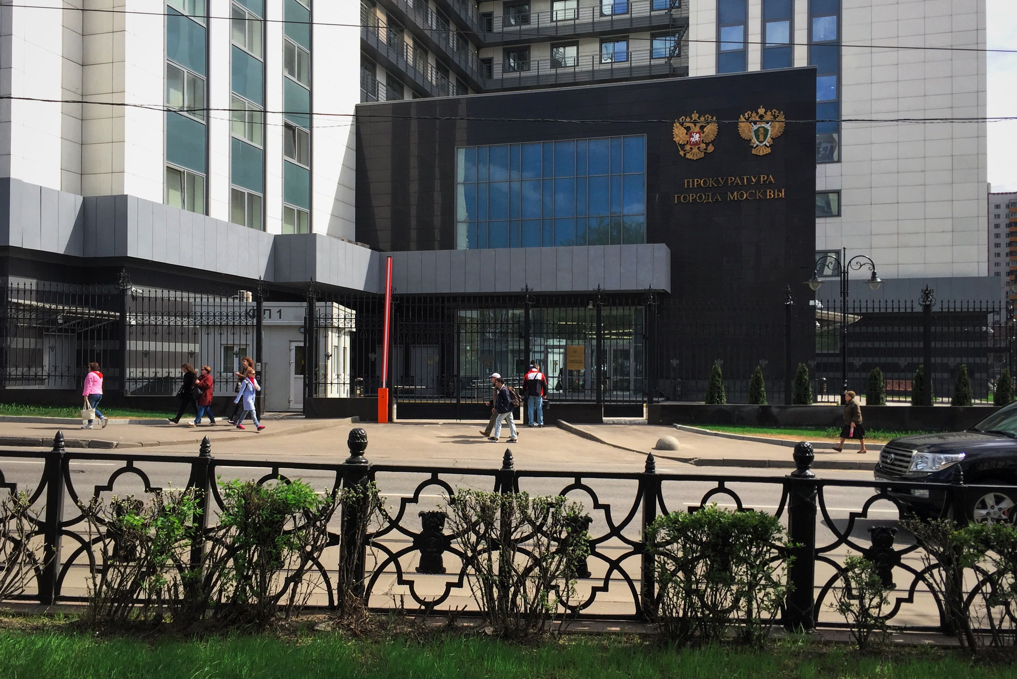 Крестьянская застава, 1 - Прокуратура г. Москвы. Серый дом в треугольнике на начале Волгоградского проспекта.